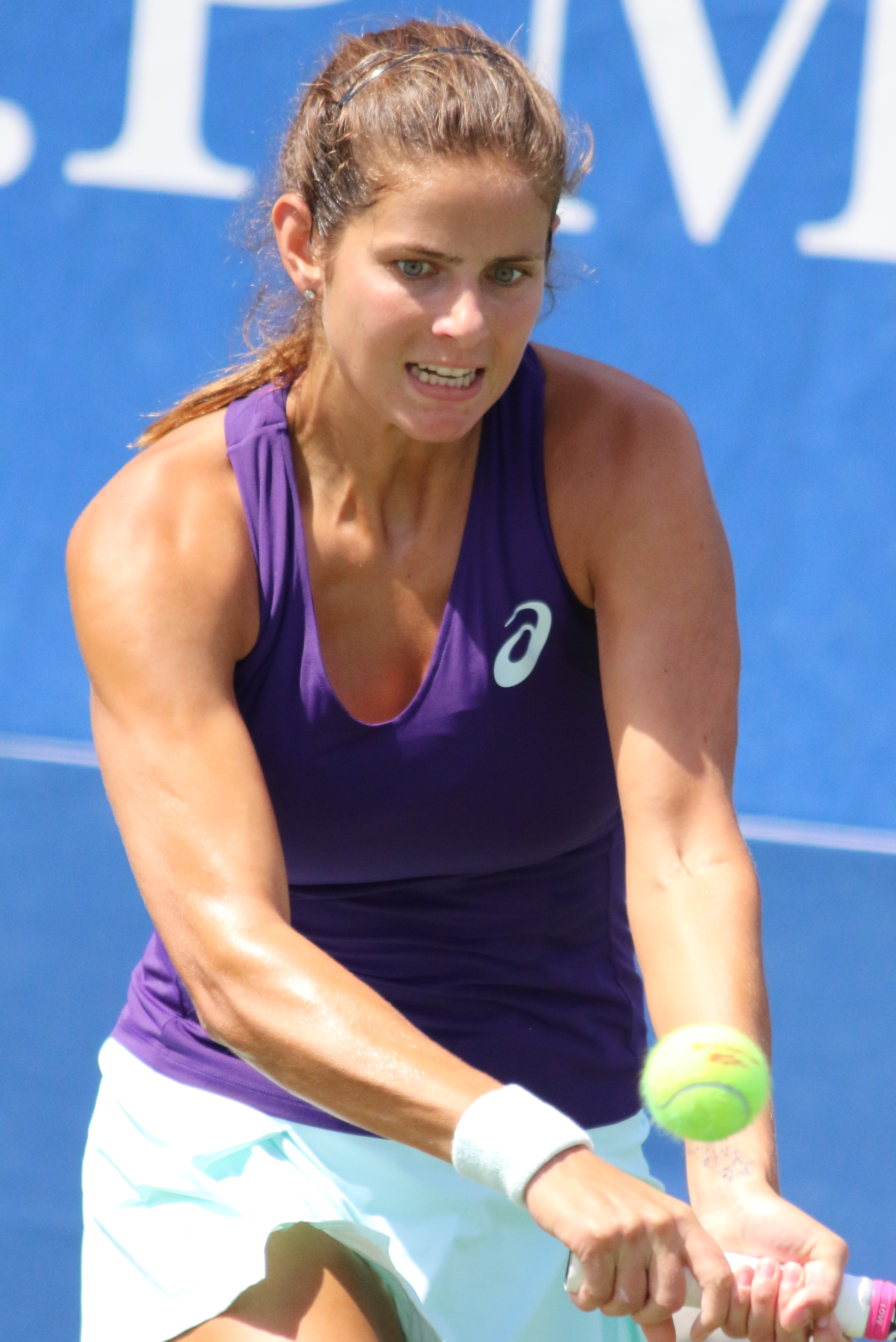 Goerges US16 (42)